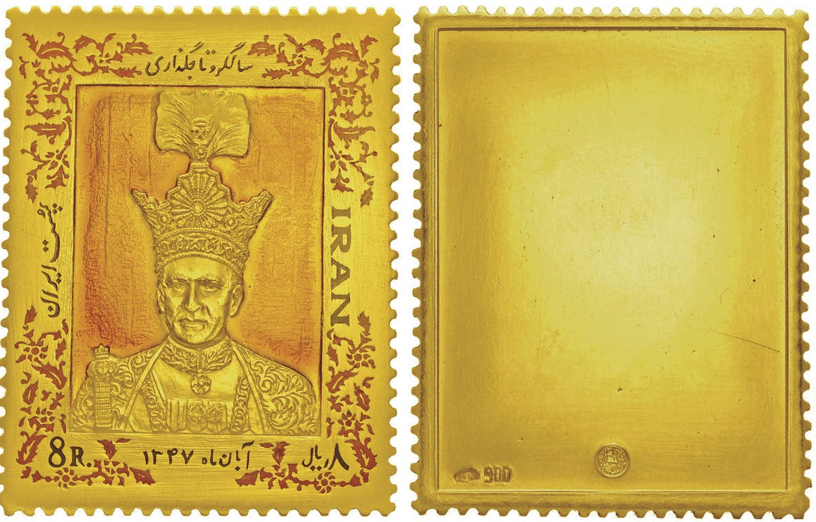 تمبر ۵۰ گرمی طلا یادبود سالگرد تاجگذاری محمدرضا پهلوی